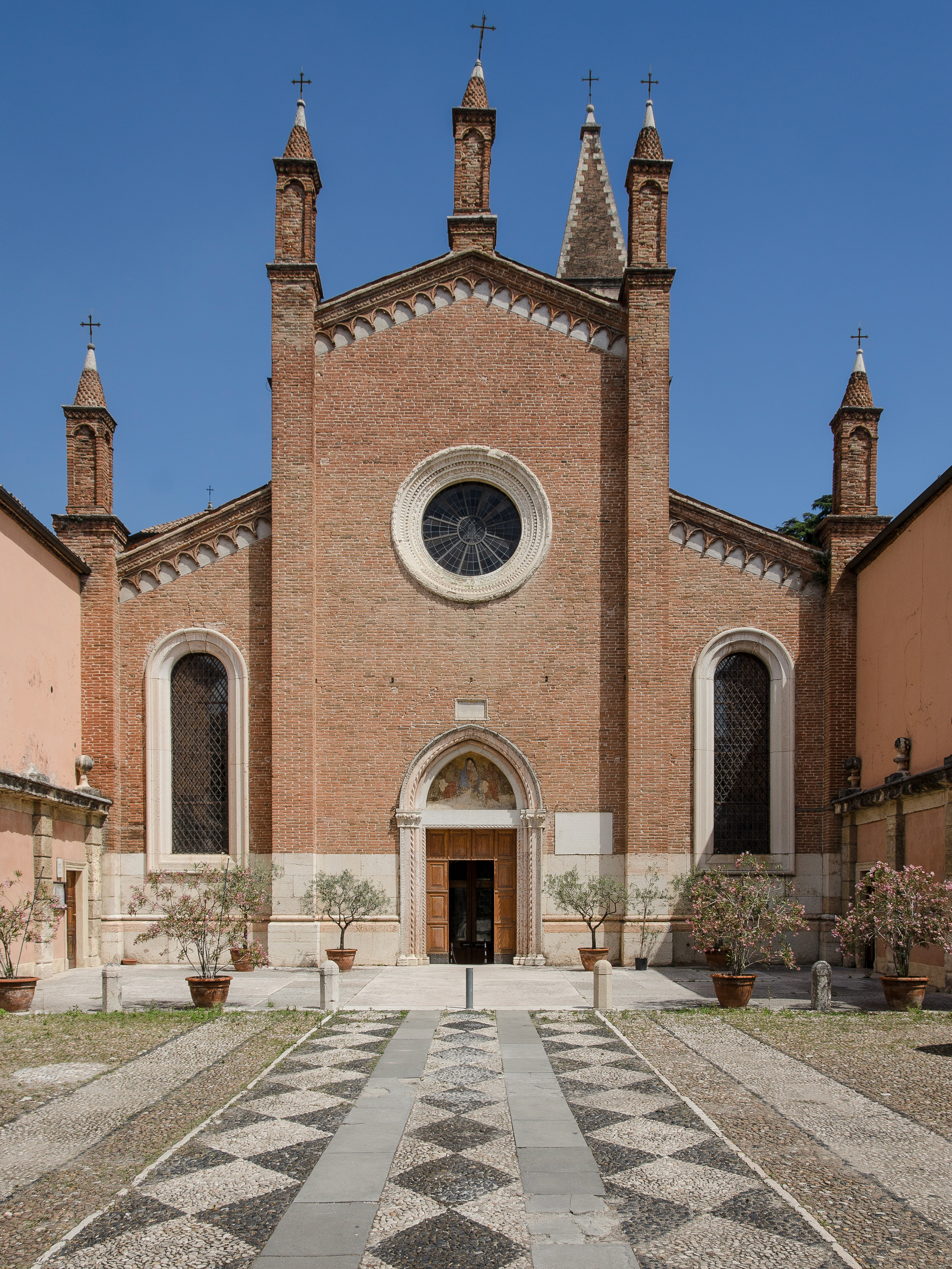 Chiesa dei Santi Nazaro e Celso a Verona. Esterno.